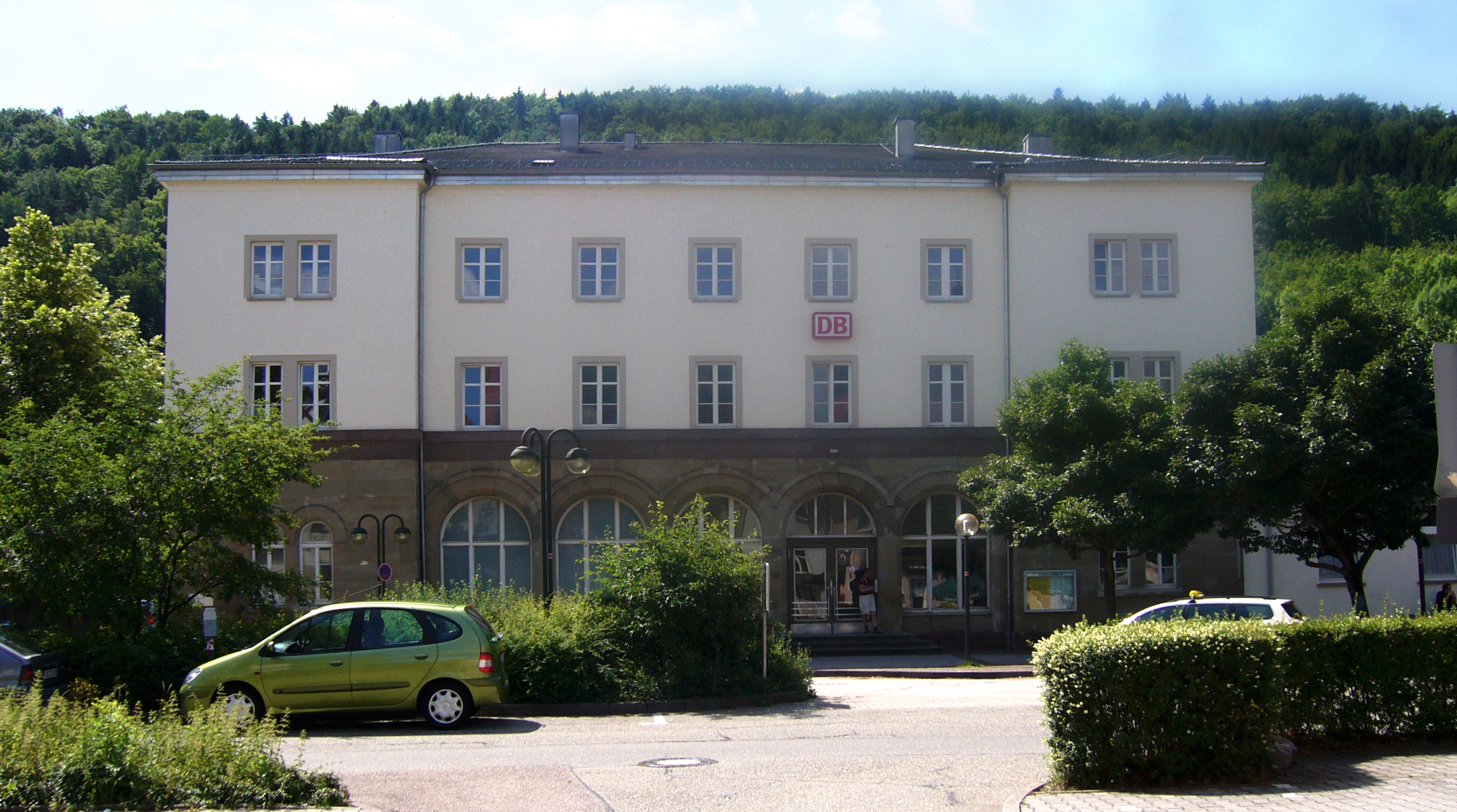 Bahnhof von Horb am Neckar.